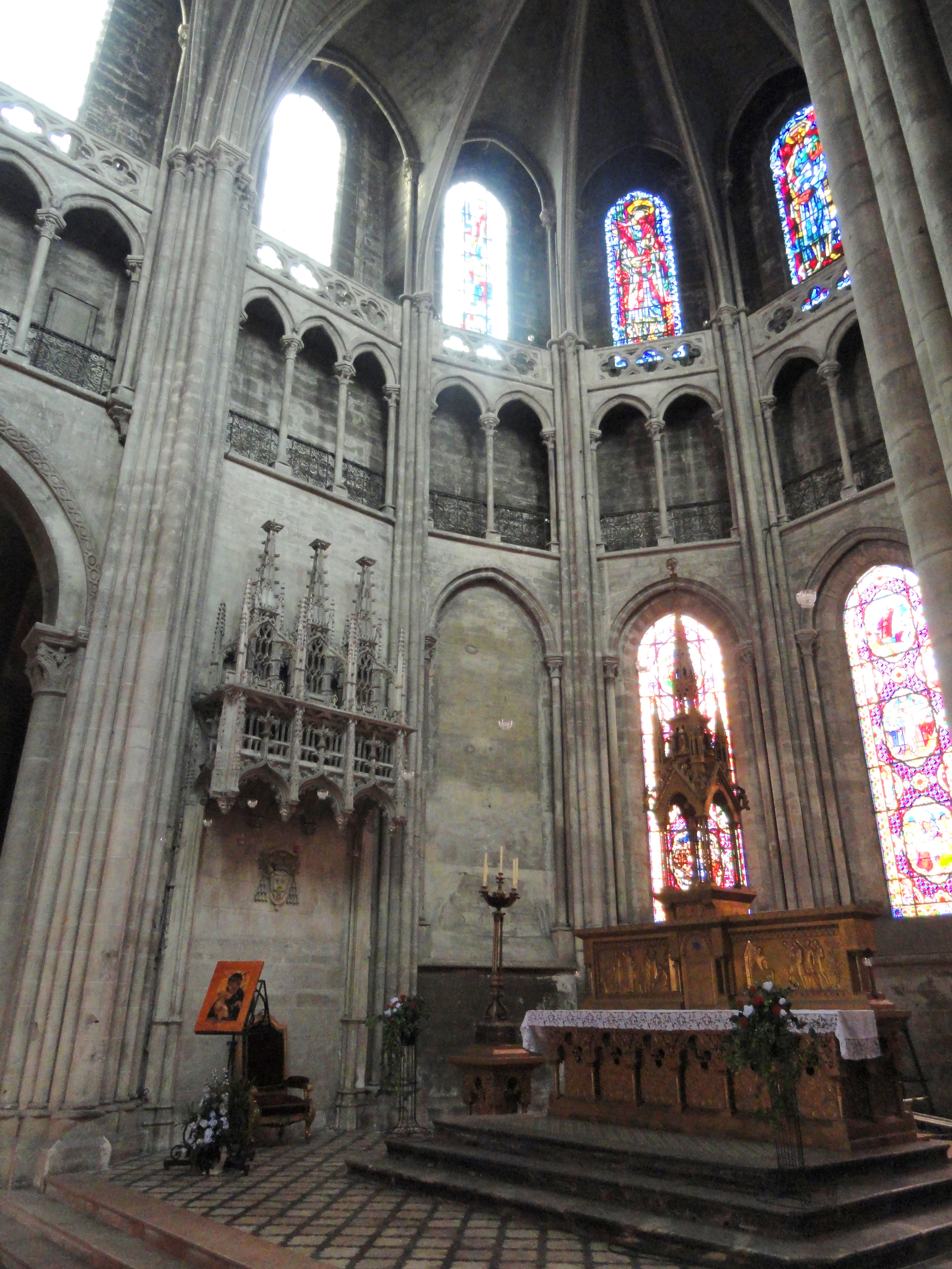 Cathédrale Saint-Vincent de Chalon-sur-Saône, Chalon-sur-Saône, Saône-et-Loire, France.